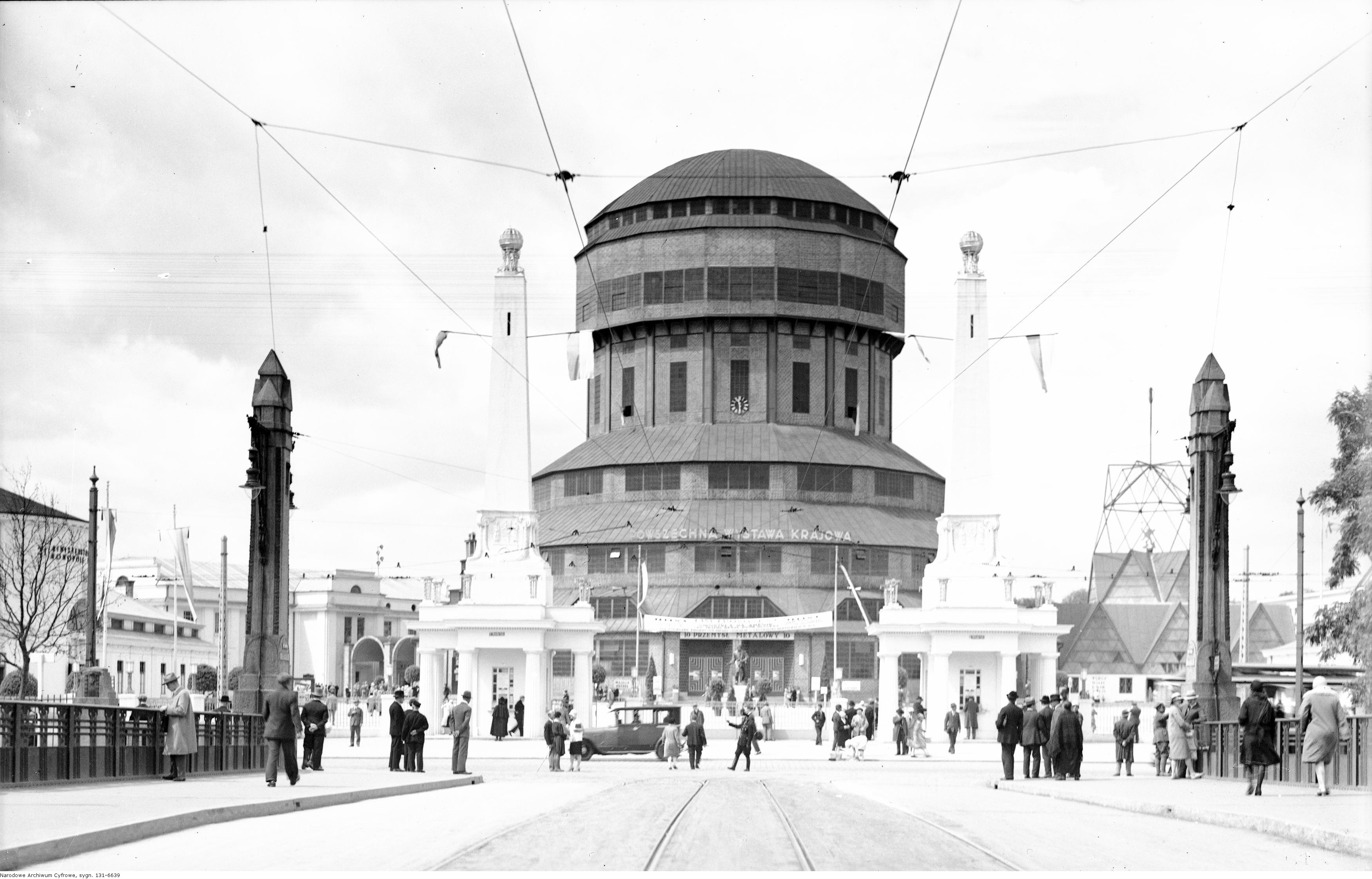 Wejście na P.W.K.